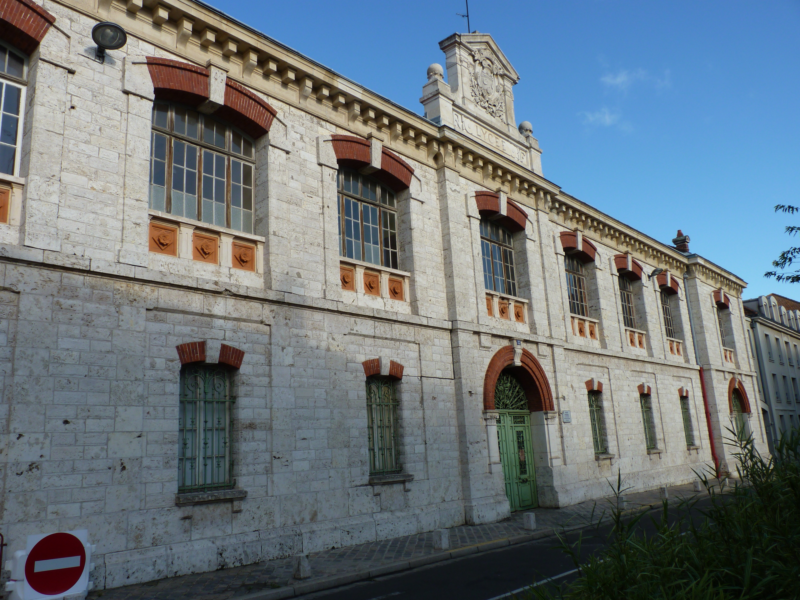 Ancien Couvent des Cordeliers - 12 rue Saint-Michel à Chartres